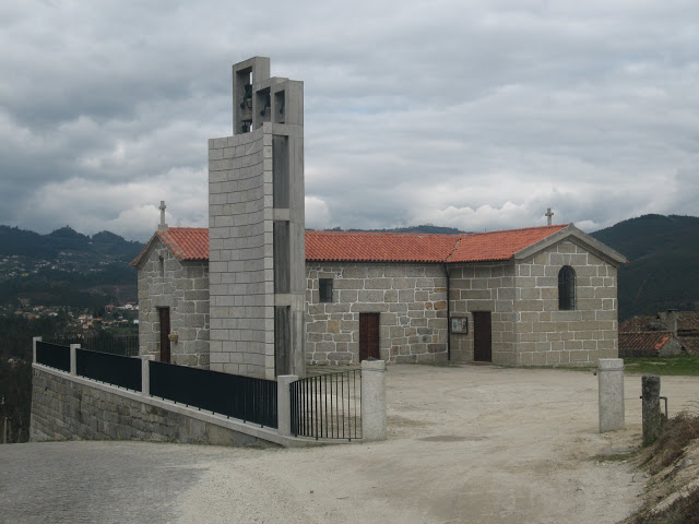 Amarante Igreja Matriz de Vila Garcia